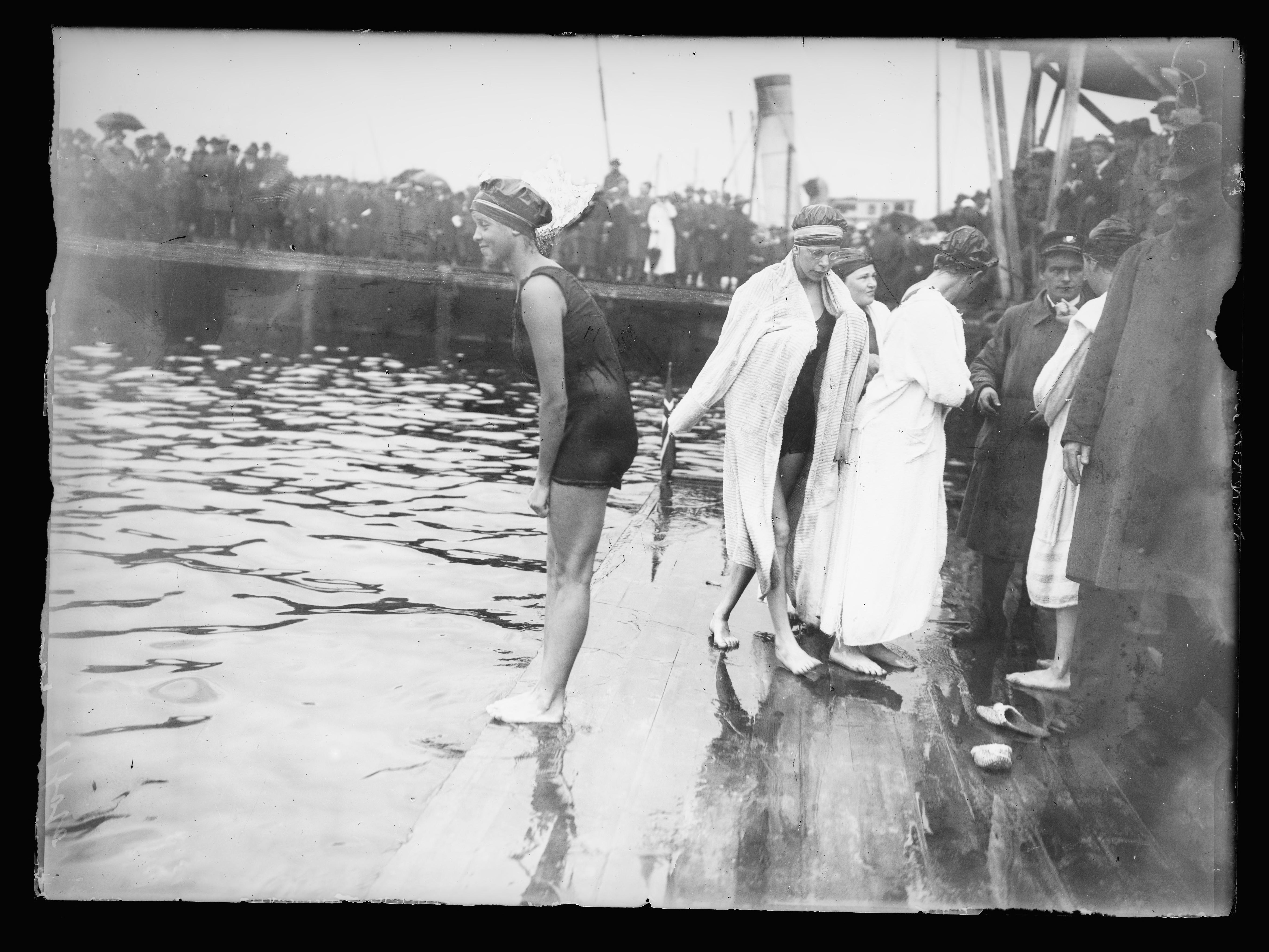 Bildet er hentet fra Nasjonalbibliotekets bildesamling. Anmerkninger til bildet var: Påskrift eske: Svømmestevne 1916 Filipstad,Oslo, Oslo, Oslo